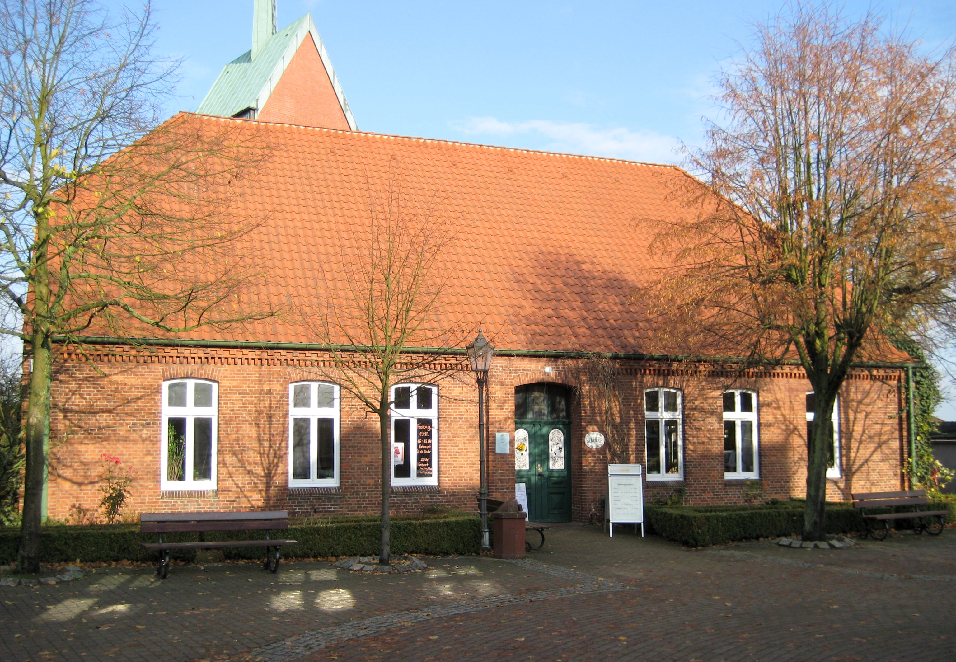 Gemeindebücherei (zuvor: Lehrer-Wohnhaus, ursprünglich: altes Schulgebäude) in Stelle (Landkreis Harburg) in Niedersachsen, Deutschland